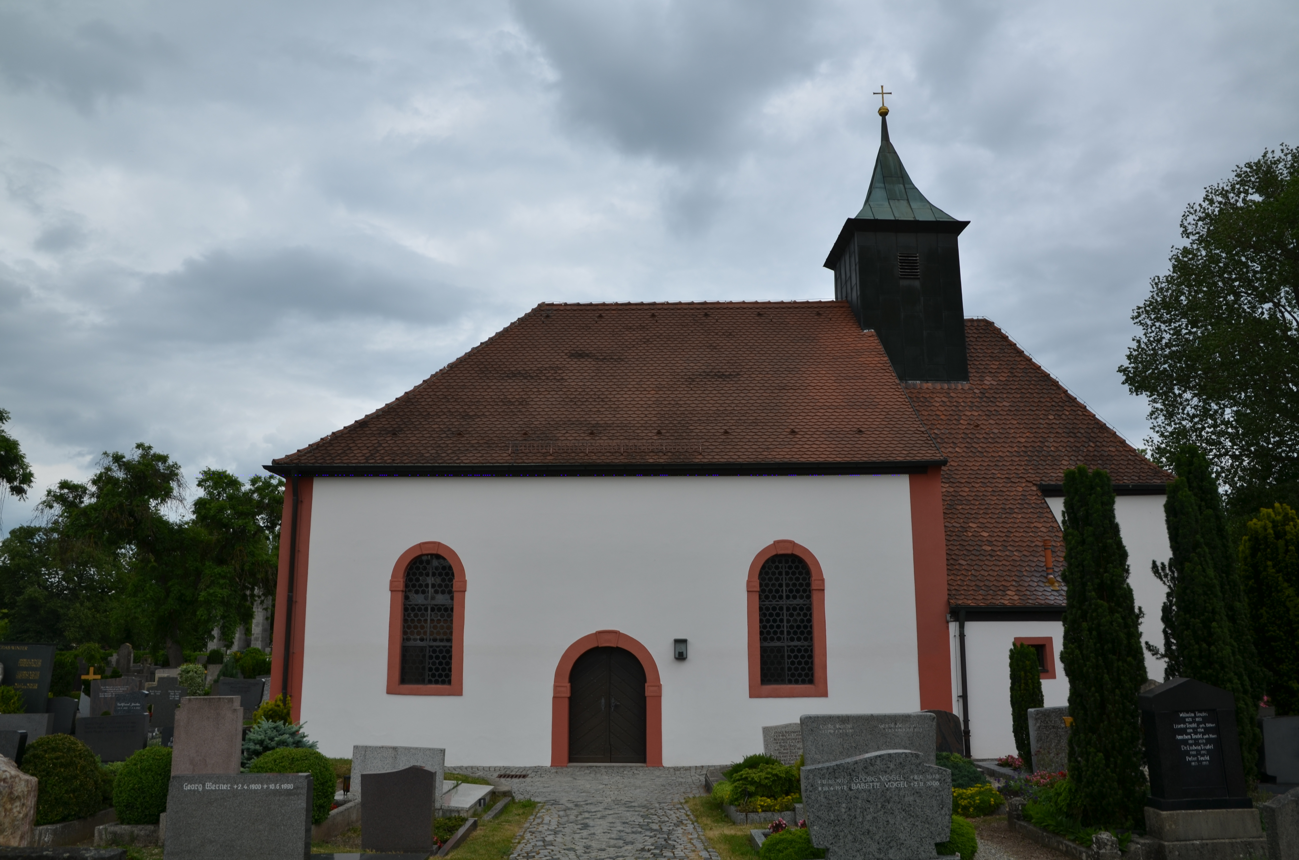 Friedhofskirche Zur Himmelfahrt Christi in Neustadt an der Aisch